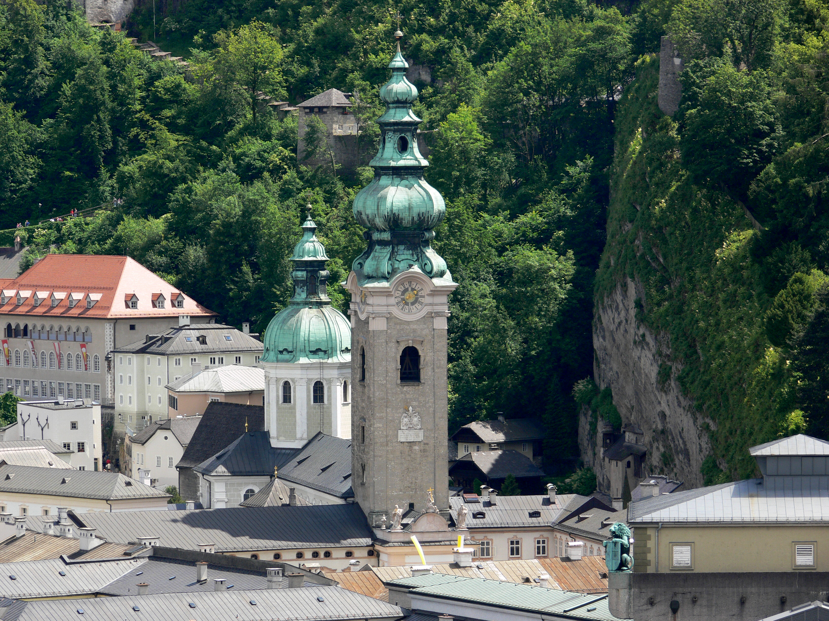 Salzburg, Aussicht vom Mönchsberg Stiftskirche St. Peter